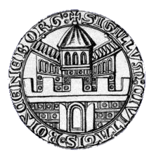 altes Stadtsiegel der Stadt Boizenburg an der Elbe